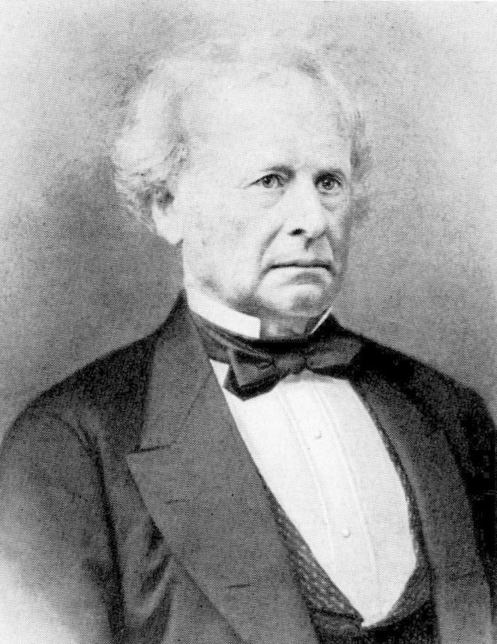 Industrimannen Samuel Godenius